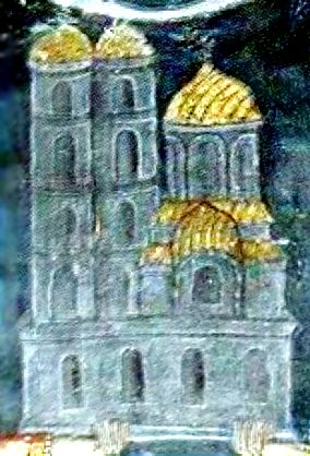 Biserica Domnească from Curtea de Argeş. Fresco detail 01